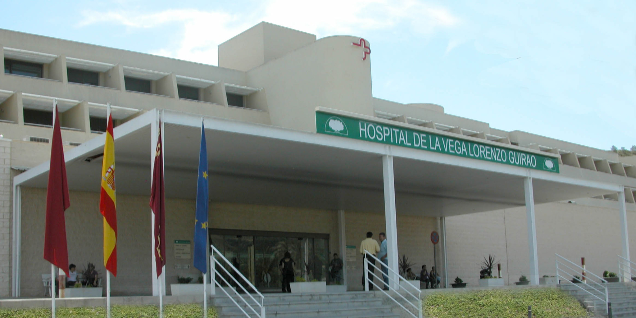 Hospital de la Vega Lorenzo Guirao, del Área de Salud IX-Vega Alta del Segura